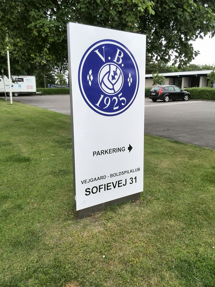 Vejgaard Boldspilklub